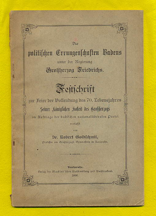 Robert Goldschmit Karlsruhe, Buchcover